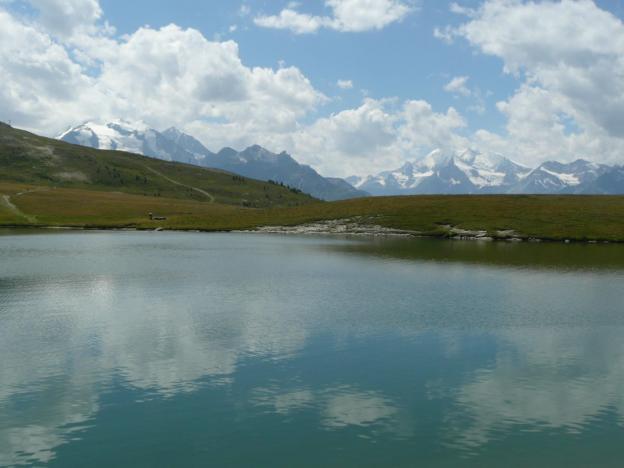 Gibidumsee